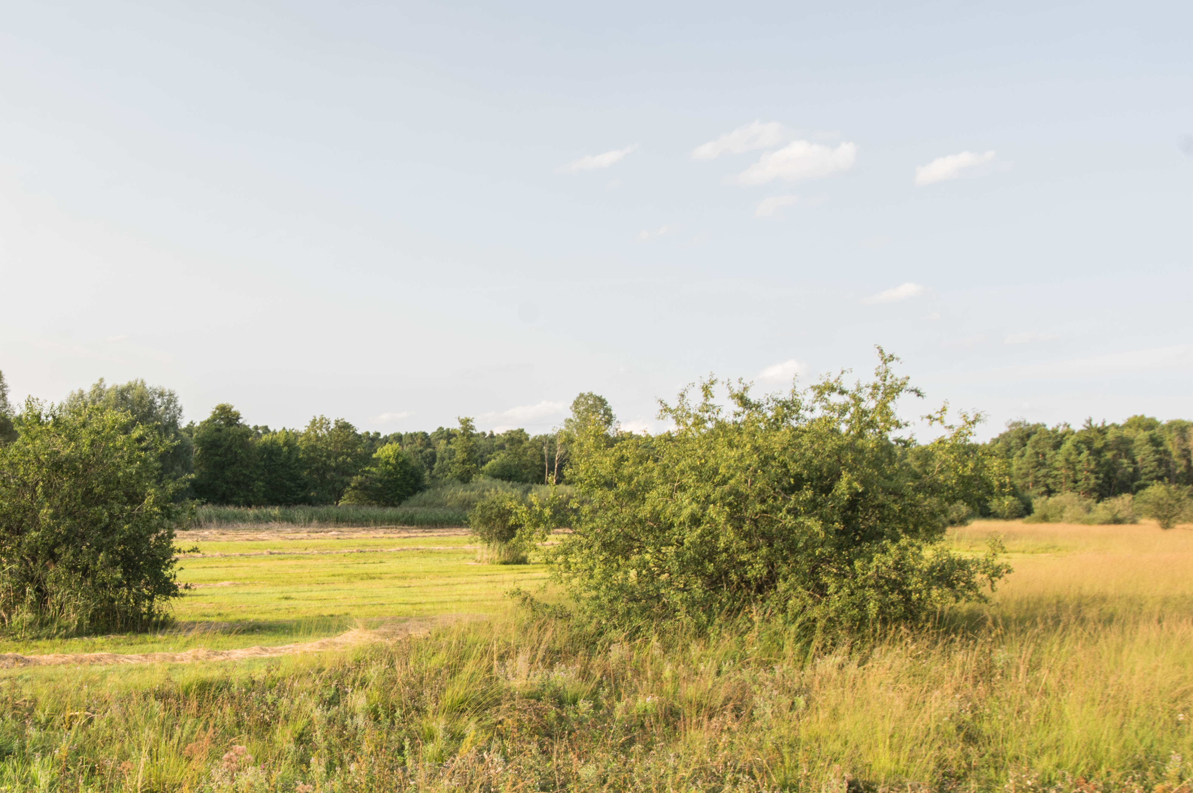 Blick in das Riedgebiet von SW, Naturdenkmal ND-06657; Naturdenkmal ND-06656, Teil des FFH-Gebietes 7130-371 Pfäfflinger Wiesen und Riedgraben bei Laub